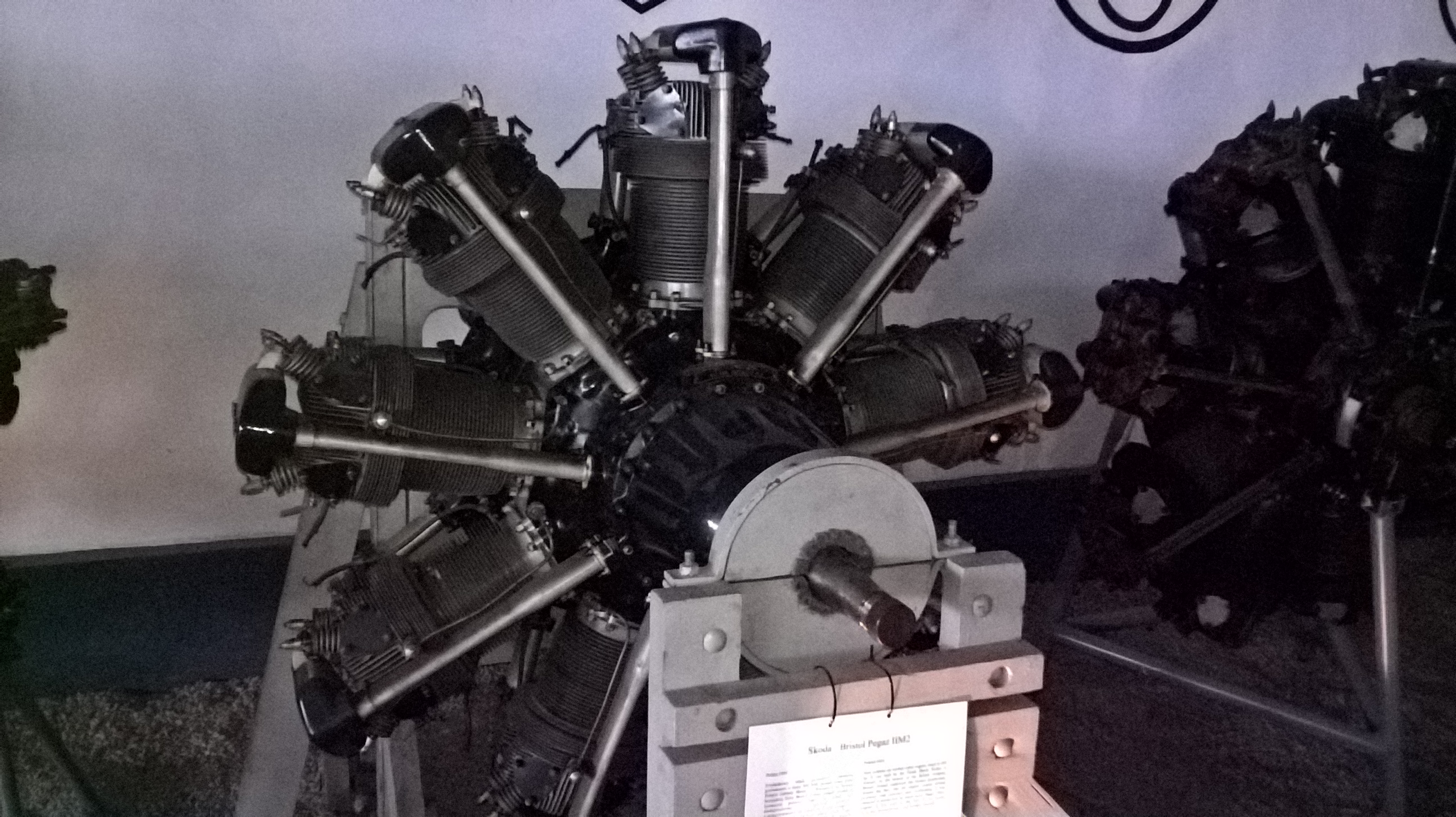 Licencyjny 9-cylindrowy silnik gwiazdowy Bristol Pegasus IIM2 z 1935 r., produkowany pod nazwą PZL Bristol Pegaz IIM2 (używany do napędu samolotów rozpoznawczo-bombowych PZL P.23A Karaś), ze zbiorów Muzeum Lotnictwa Polskiego w Krakowie.